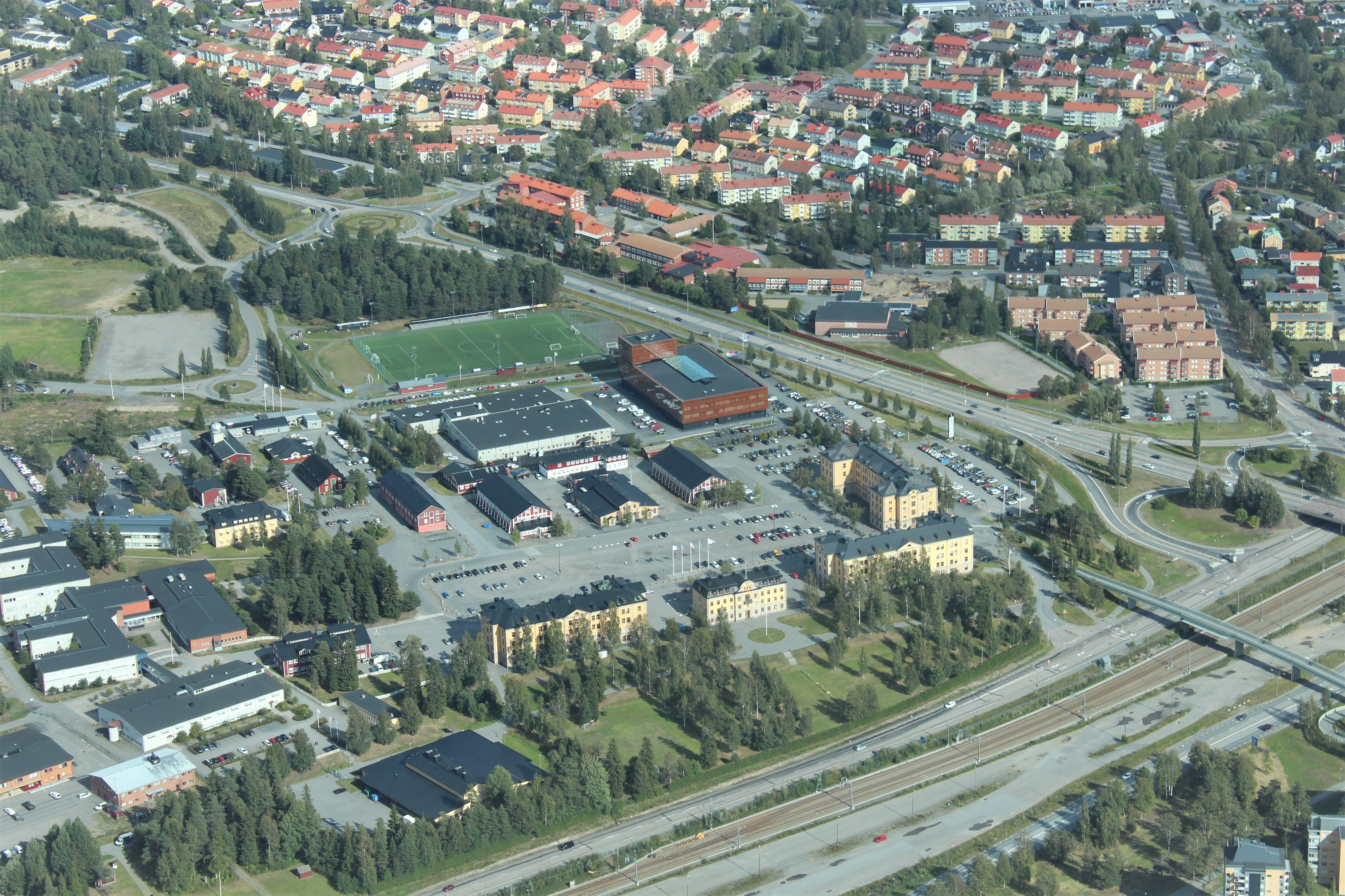 Flygfoto över Umestean